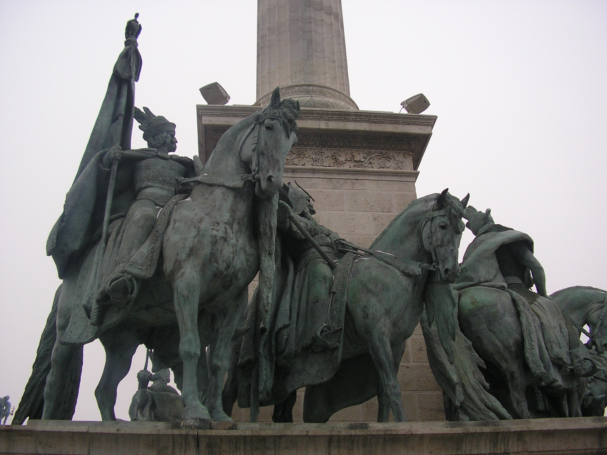 Budapest. לוחם מגיארי - פרט מתוך "אנדרטת המילניום" בכיכר הגיבורים בבודפשט